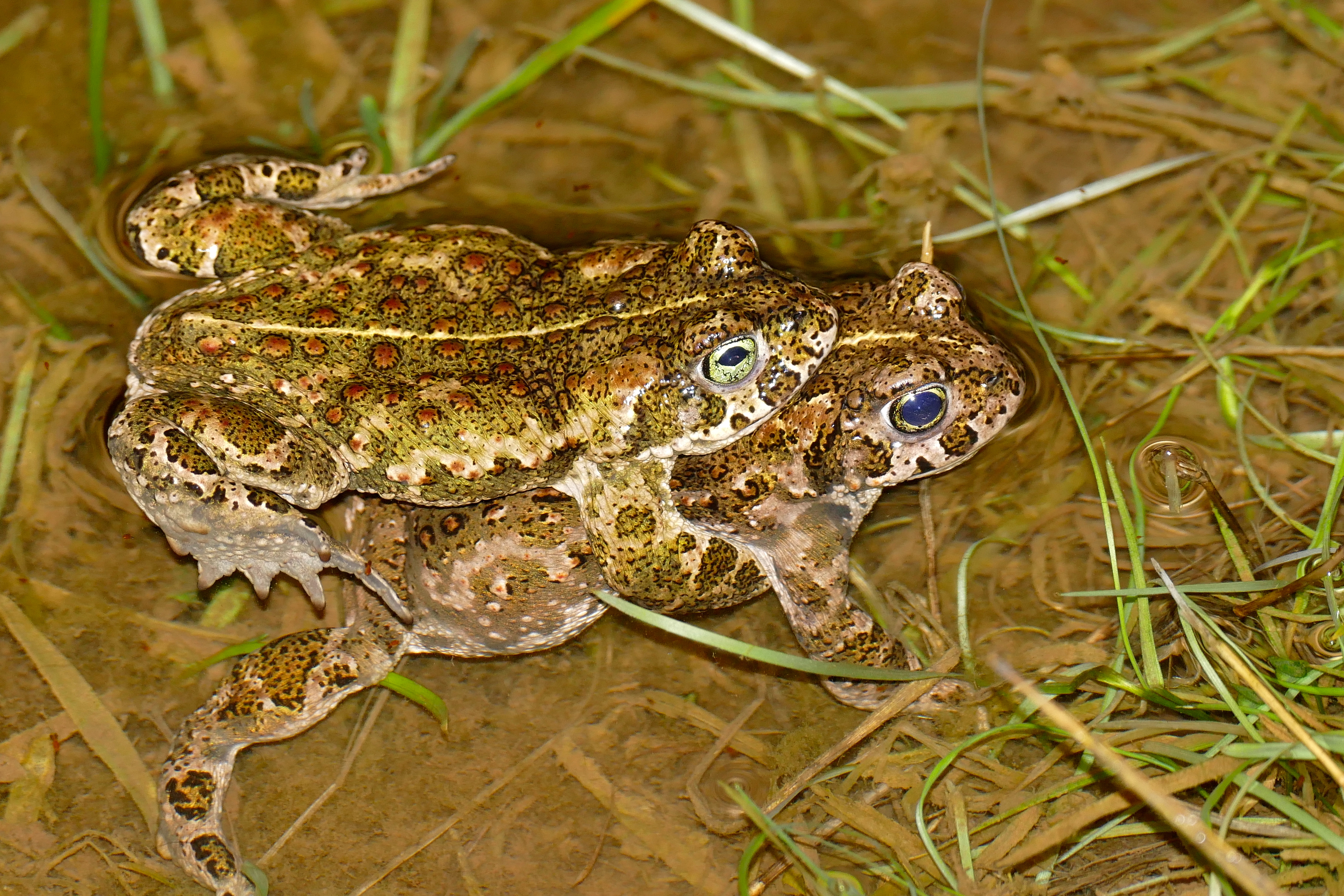 Lac des Rives, Les Rives, Hérault, FRANCE